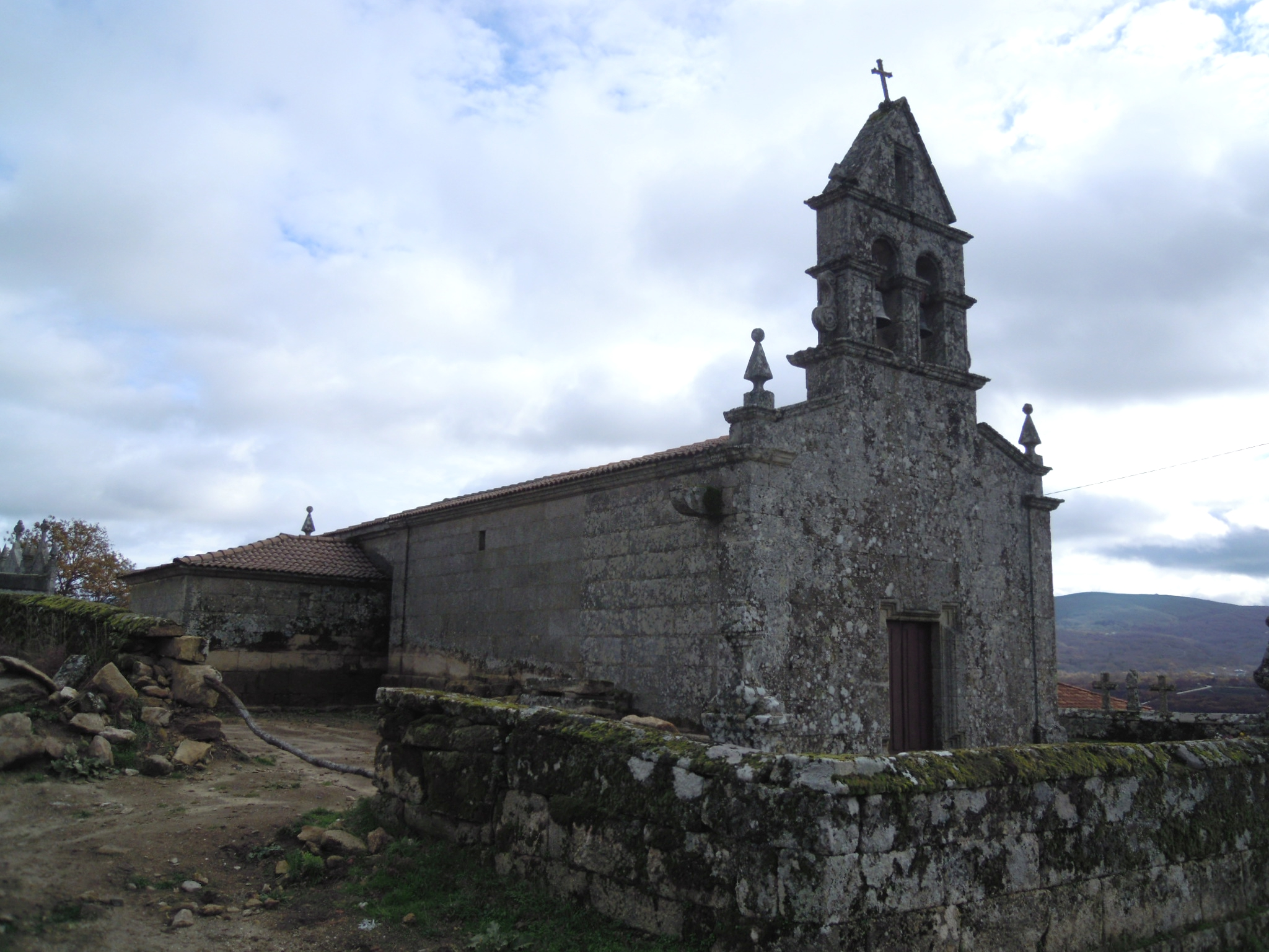 Igrexa parroquial de San Lourenzo de Tosende (Baltar).